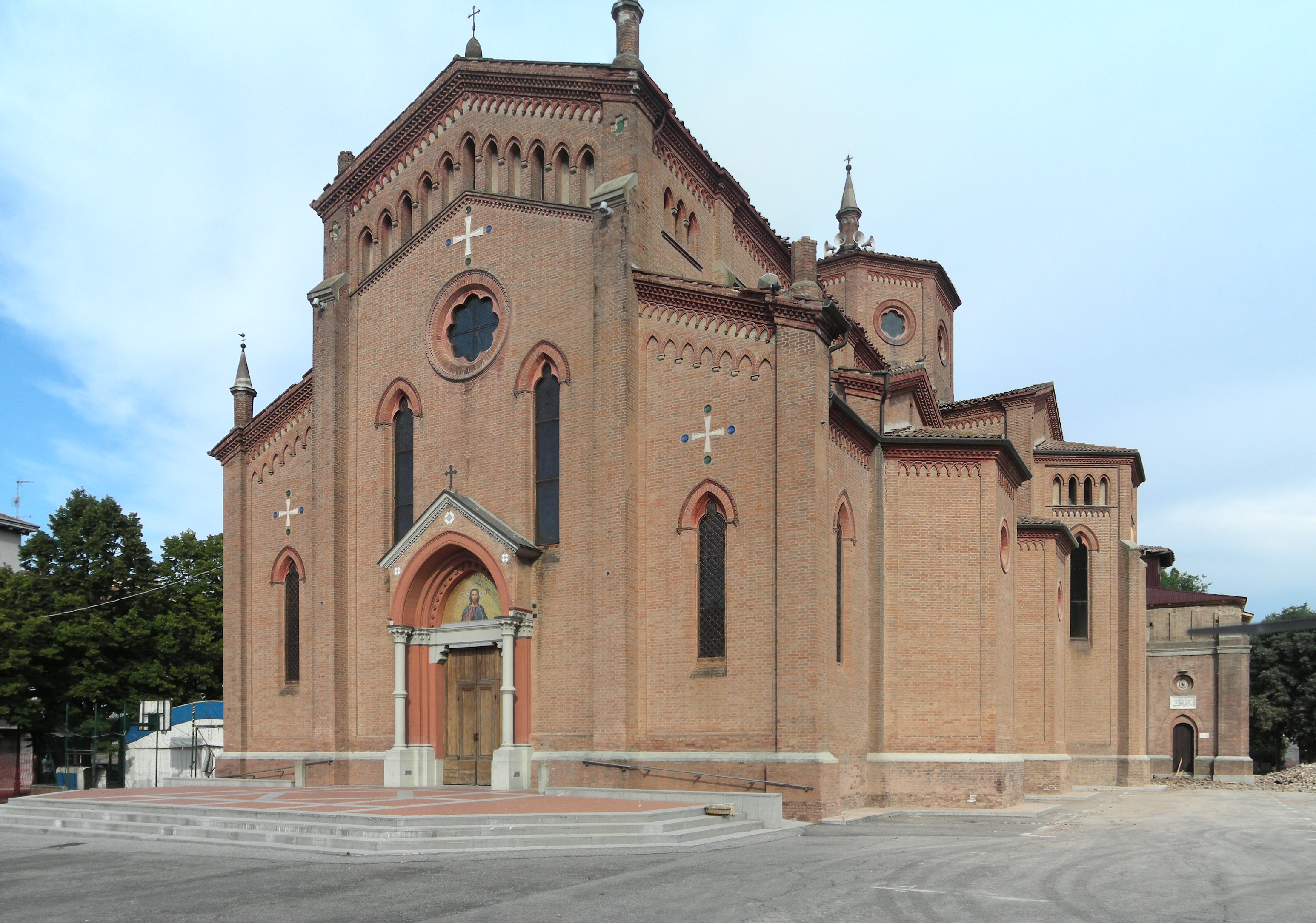 Abbazia di San Michele Arcangelo a Poggio Renatico. In stile gotico-lombardo del XIV secolo, è stata inaugurata nel 1907. Sul tetto sono visibili i danni del terremoto dell'Emilia del 2012. Sulla destra si intravedono i detriti derivanti dai resti del campanile, demolito con 120 microcariche di dinamite dopo essere rimasto seriamente danneggiato dal terremoto.